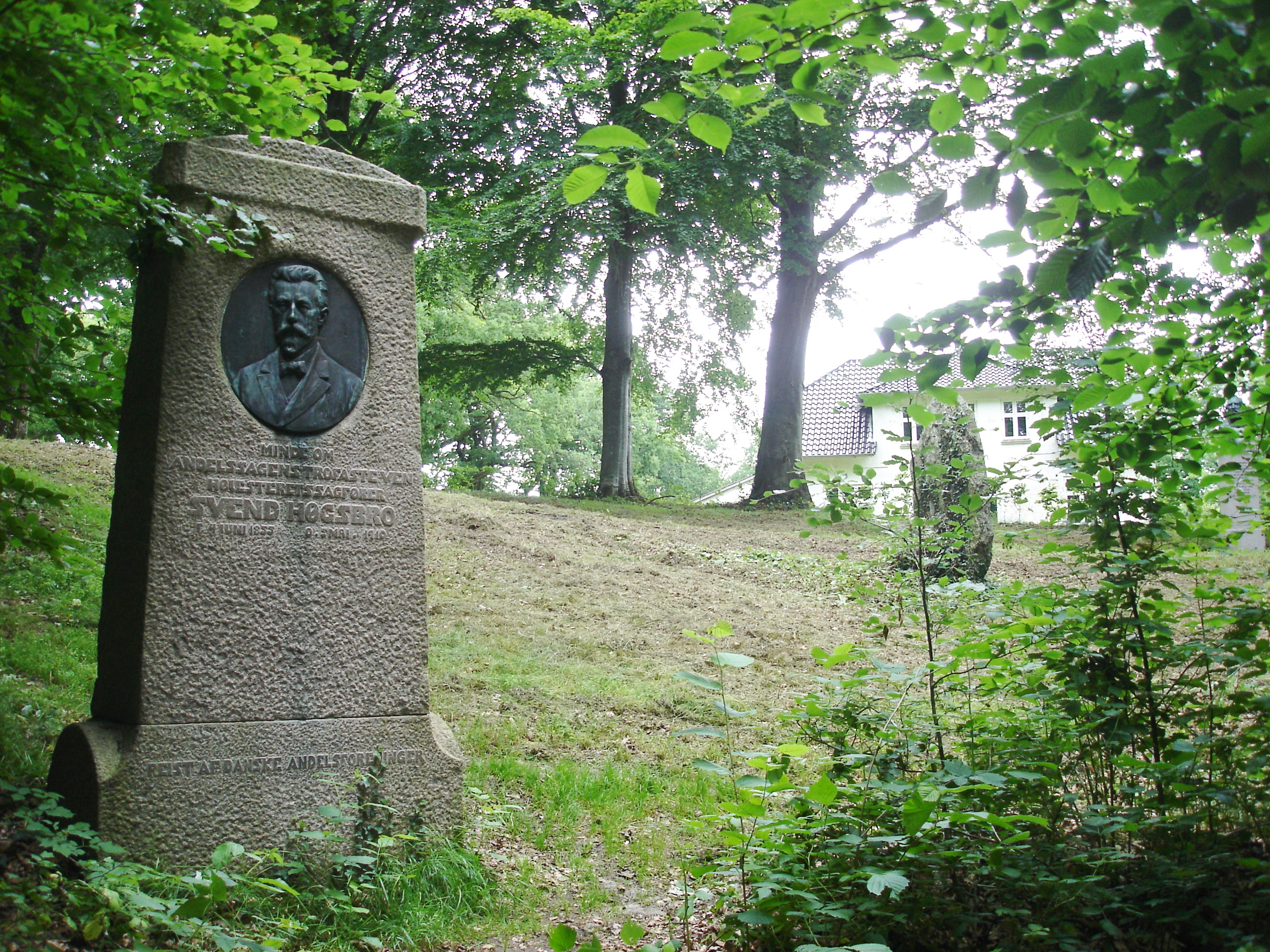 Skibelund Krat, tv. Elias Ølsgaards protrrætrelief af Svend Høgsbro